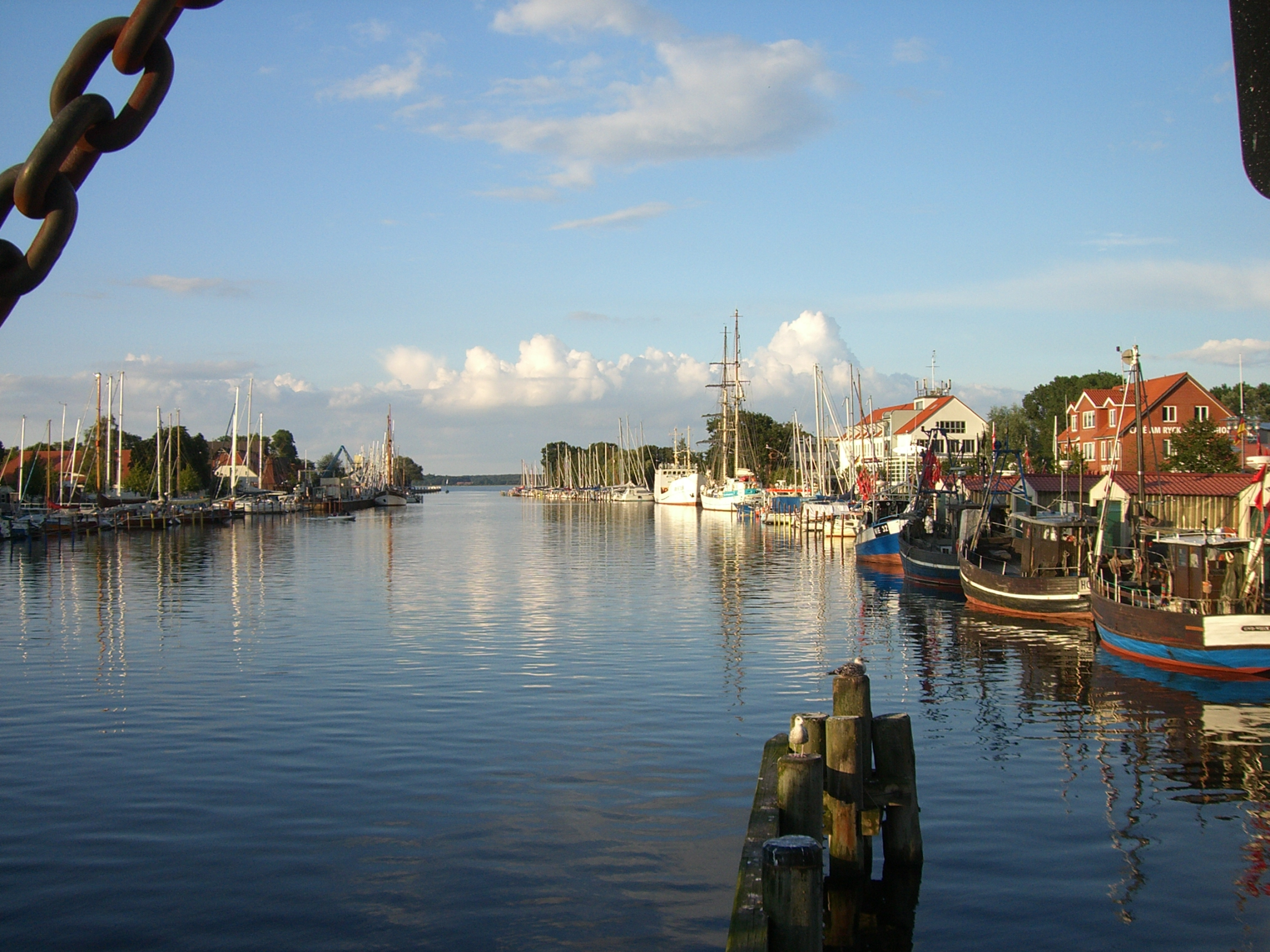 Greifswald seaside